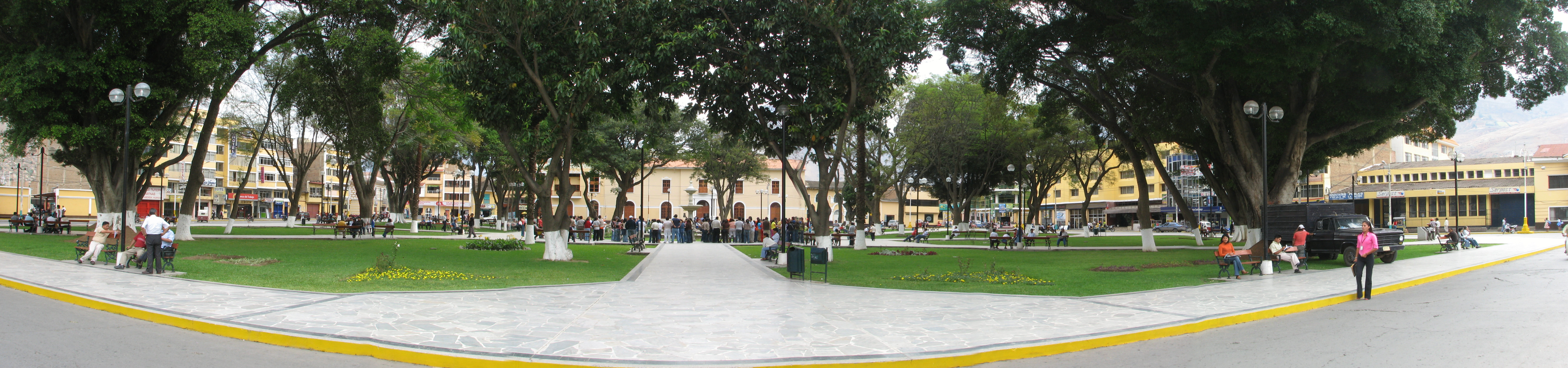 Central plaza in Huánuco/Huánuco/Huánuco, Peru.